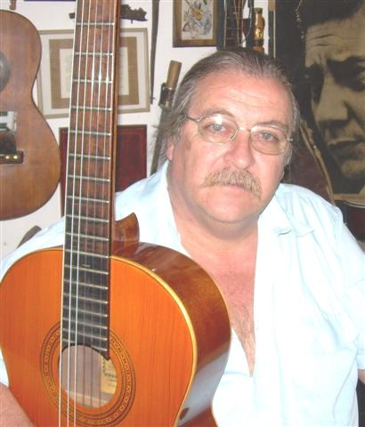 Roberto Diringuer, solista.